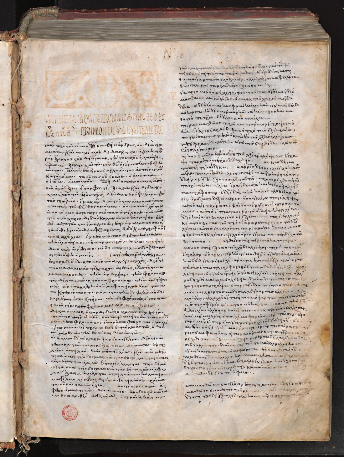 Folio 1 recto